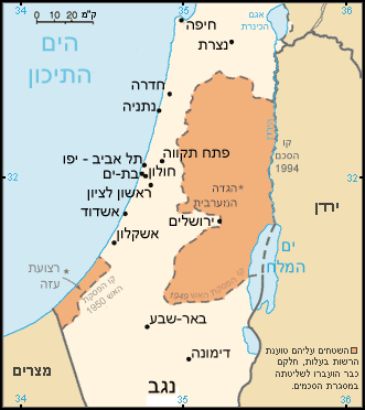 מפת הרשות